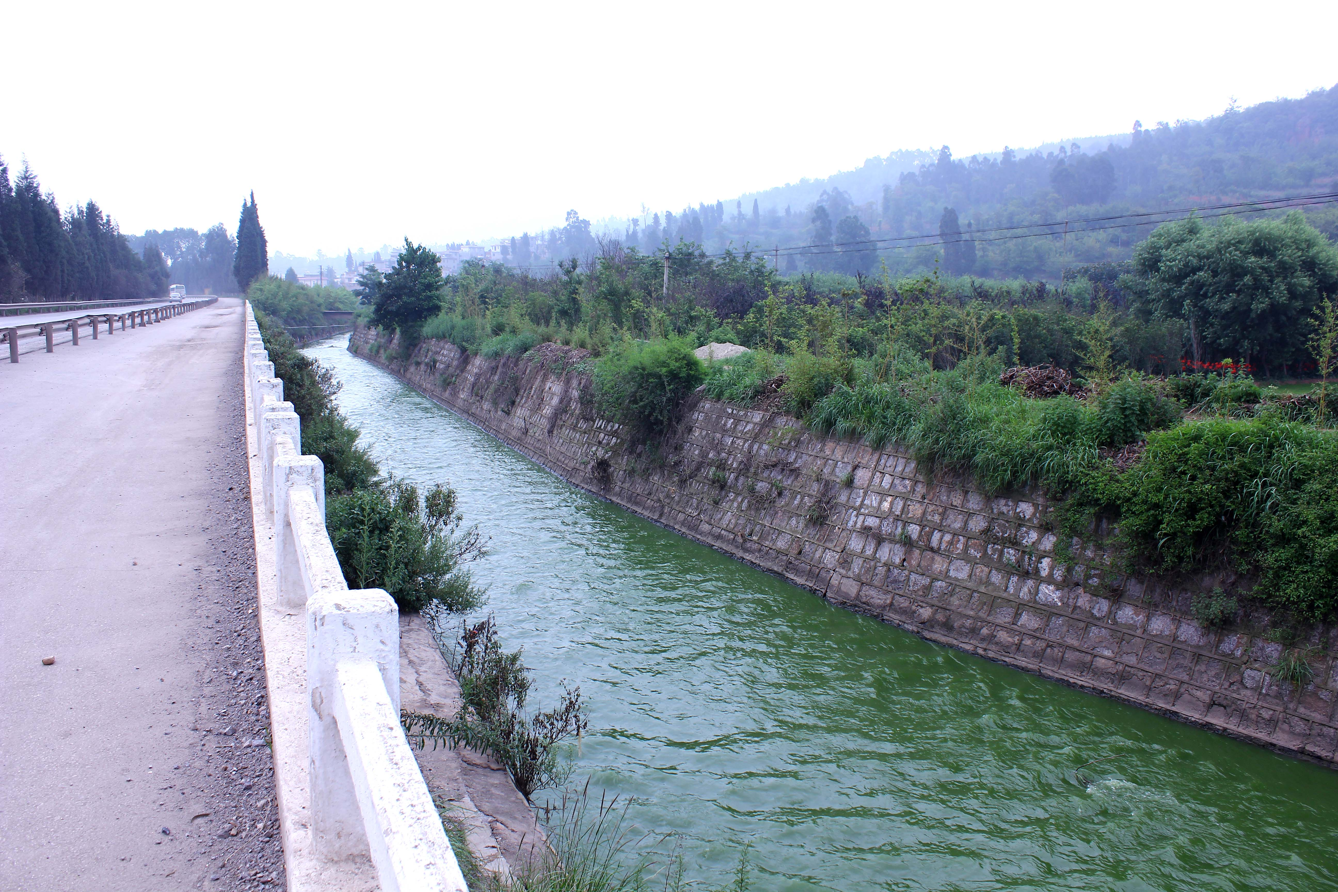 云南省安宁市读书铺附近、320国道旁的沙河。